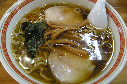 荻窪ラーメンの象徴的存在「春木屋」の中華そば。鰹だしの効いた和風しょうゆ。